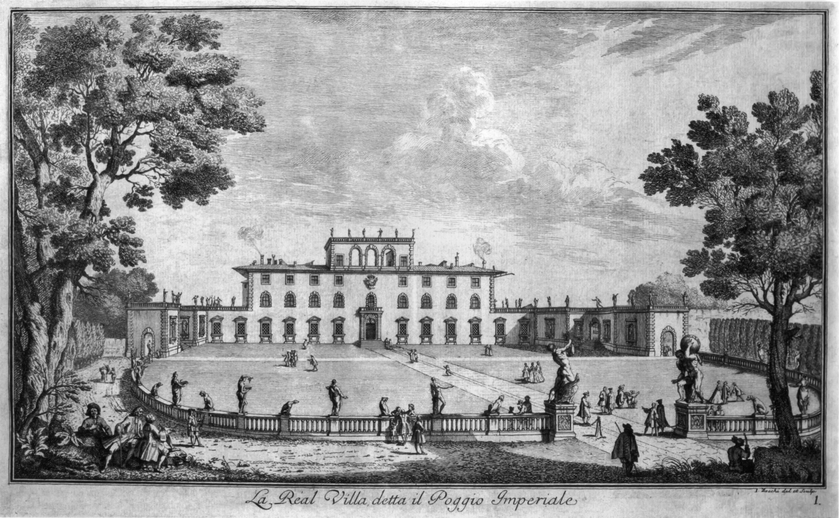 Zocchi, ville 03 poggio imperiale